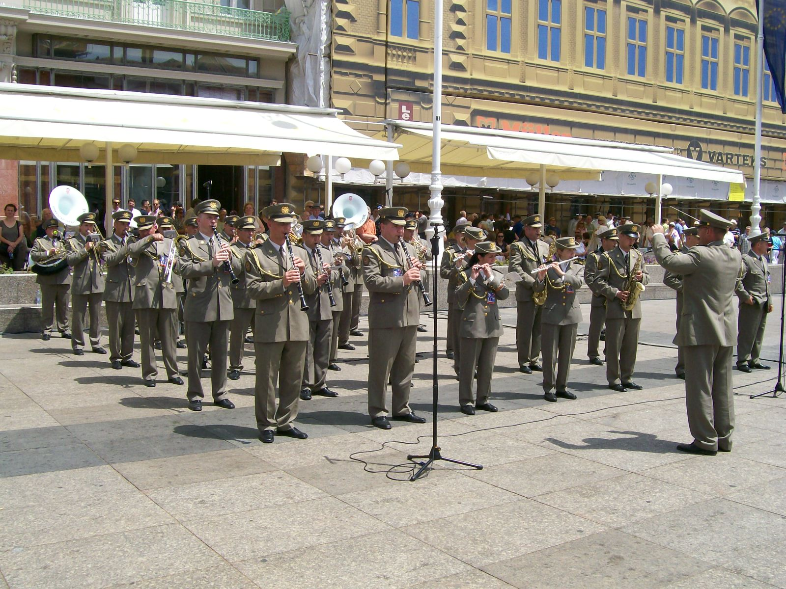 Orkesar Hrvatske vojske